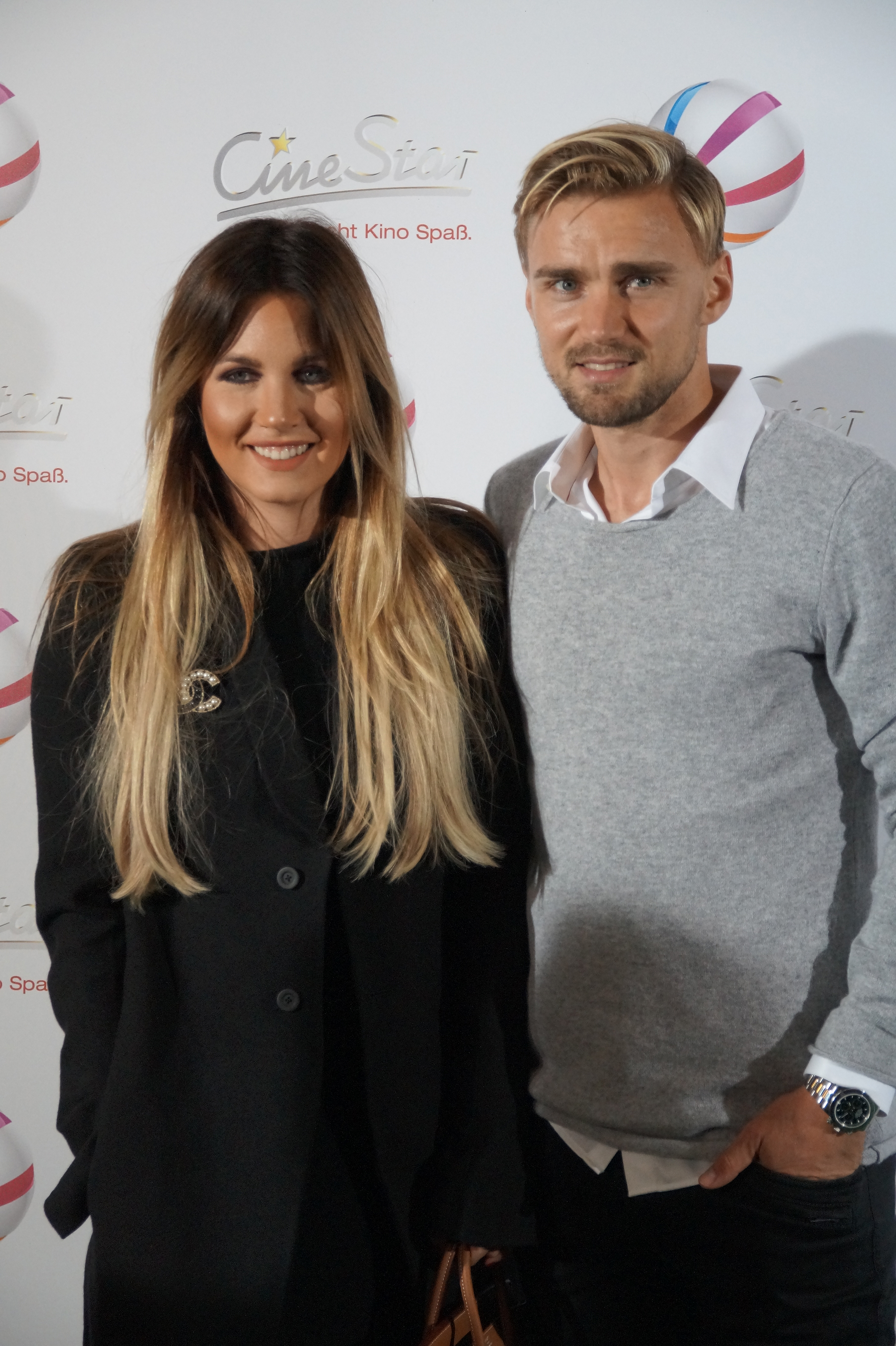 Jenny und Marcel Schmelzer bei der Premiere des Sat.1 Filmes "Volltreffer", am 29.9.16, in Dortmund.